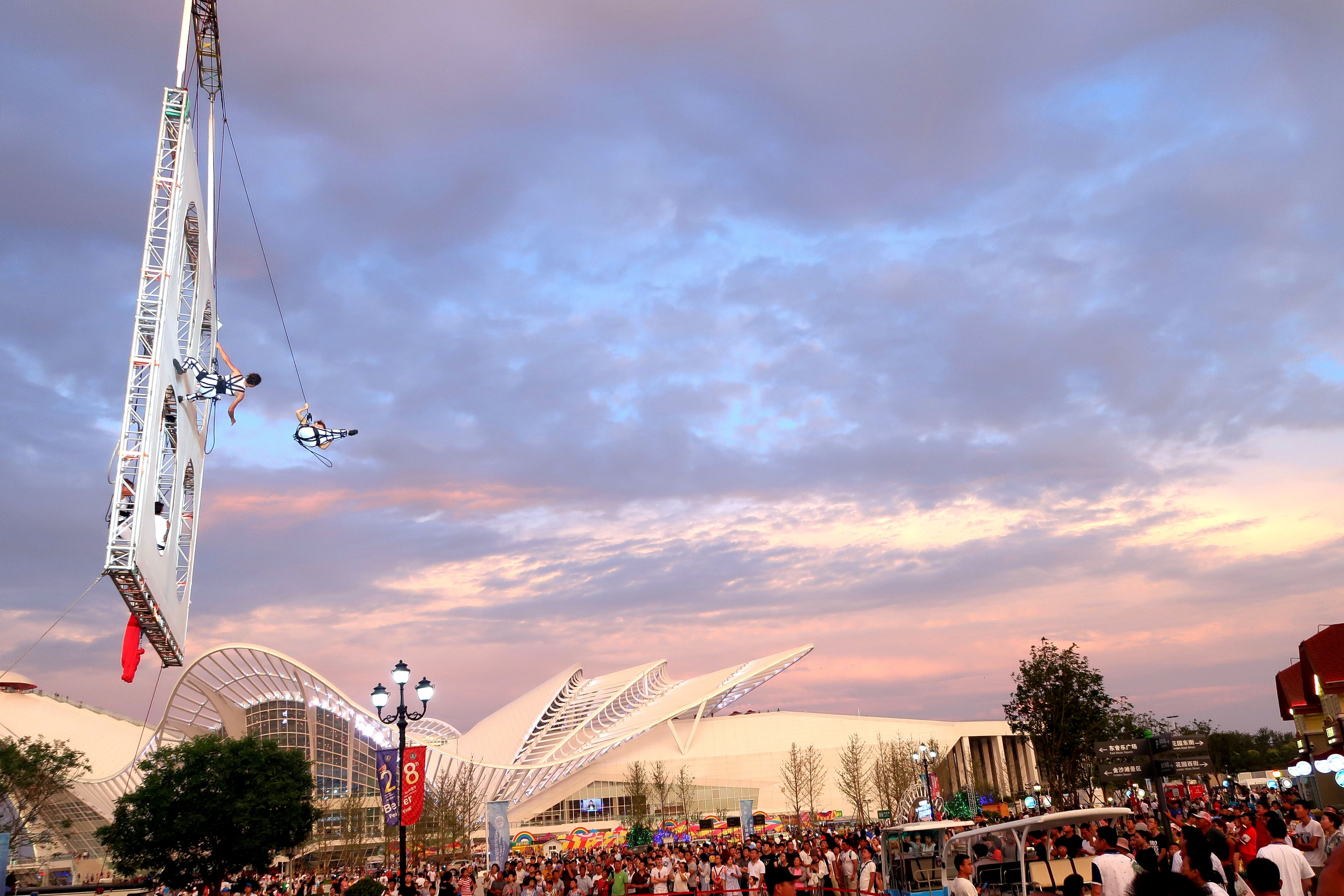 eVenti Verticali presenta nel 2018 la performance Quadro a Tsingtao (Cina)